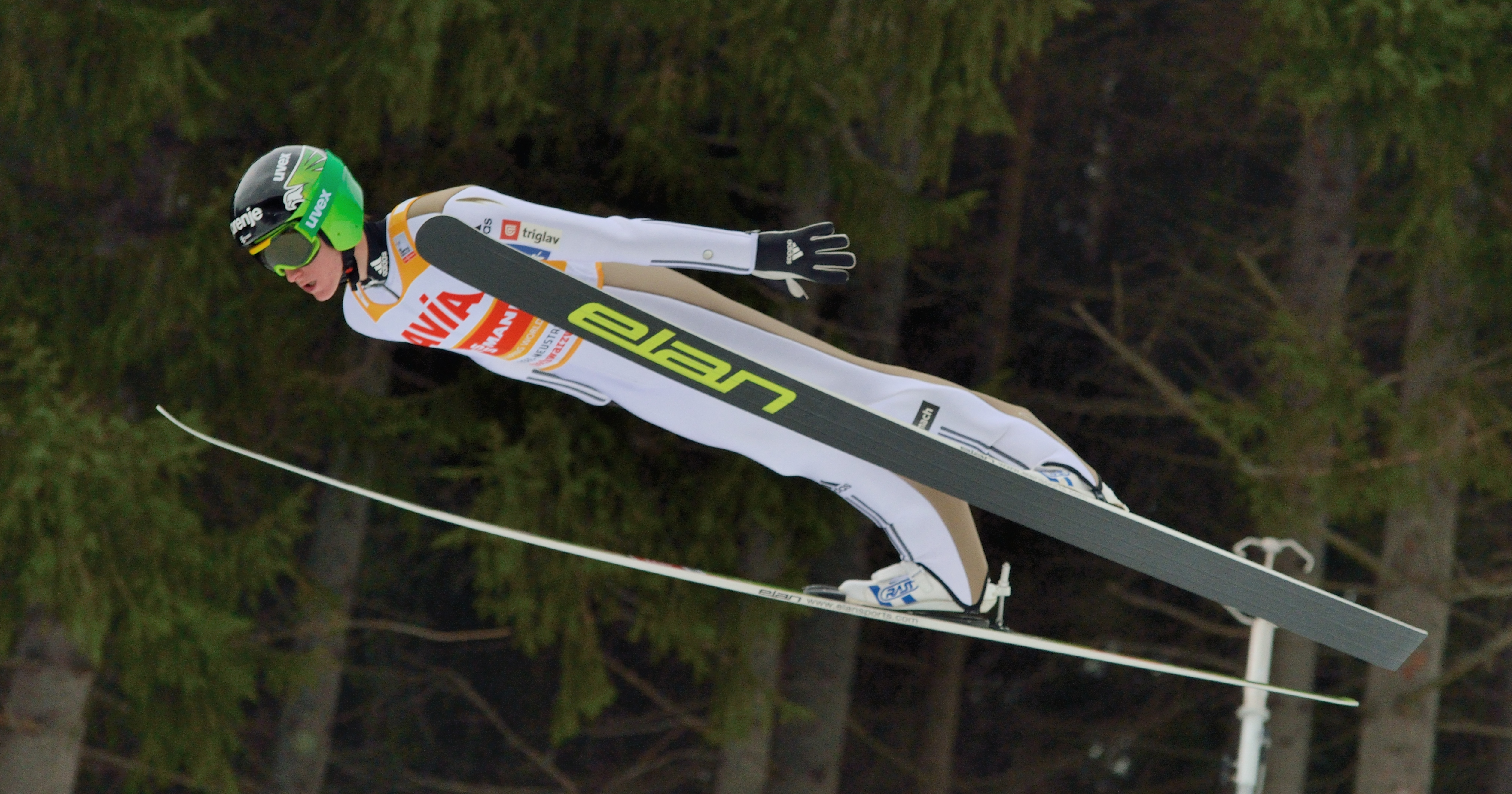 FIS Ski Weltcup Titisee-Neustadt 2016: Peter Prevc